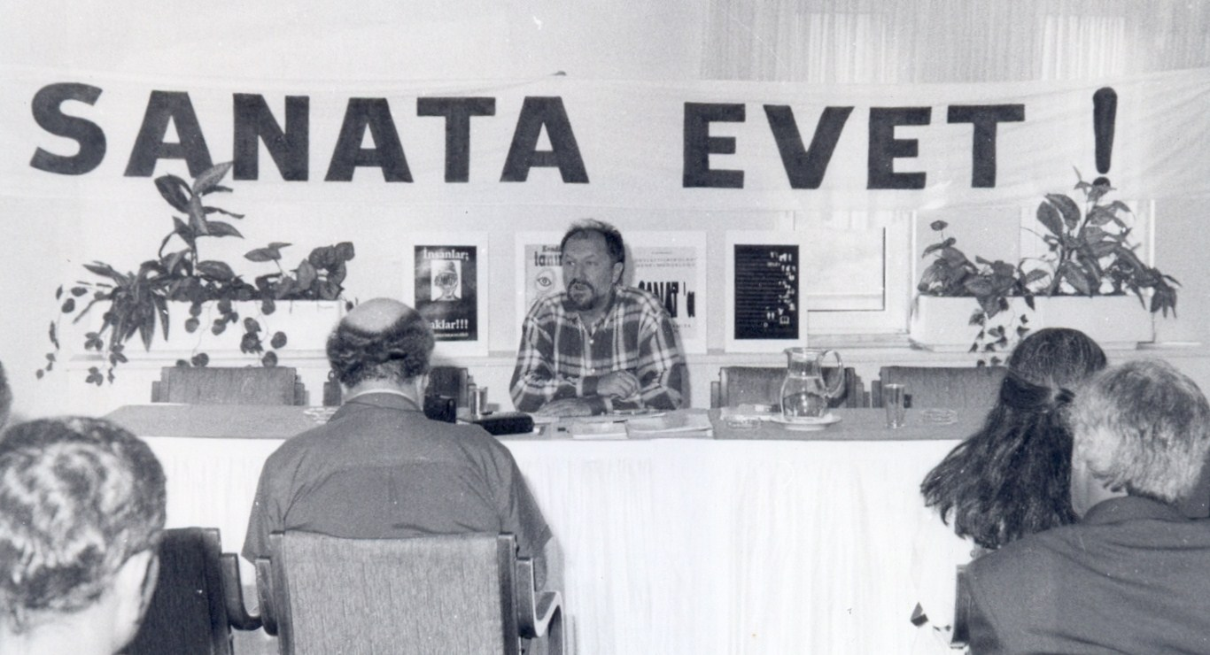 Sanata Evet! kampanyası ile ilgili bir seminer